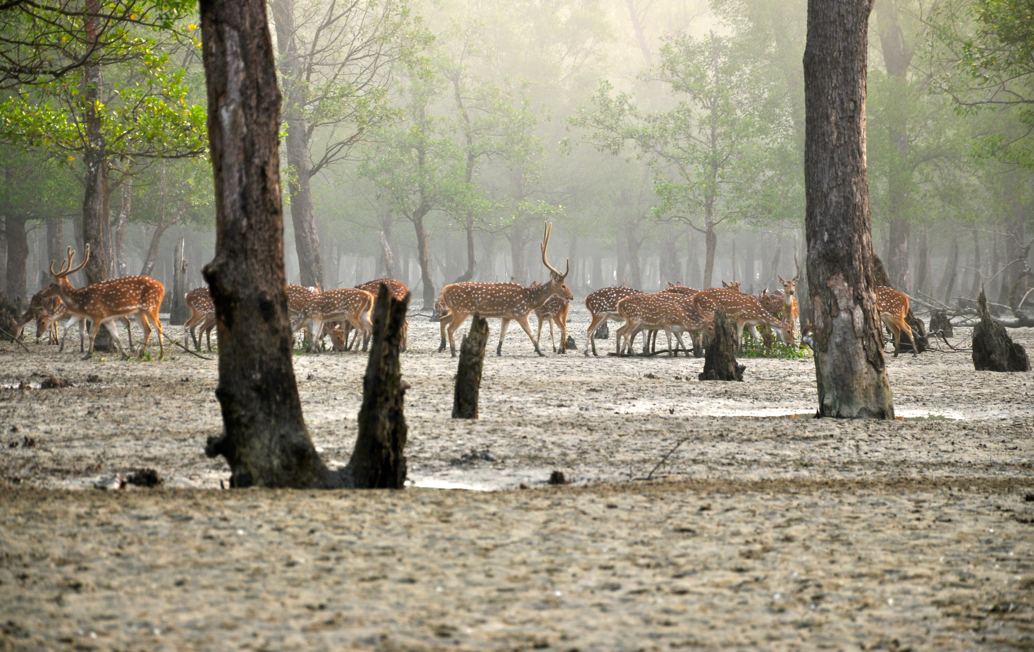 Eine Herde Axishirsche tief in den Sundarbans von Bangladesh